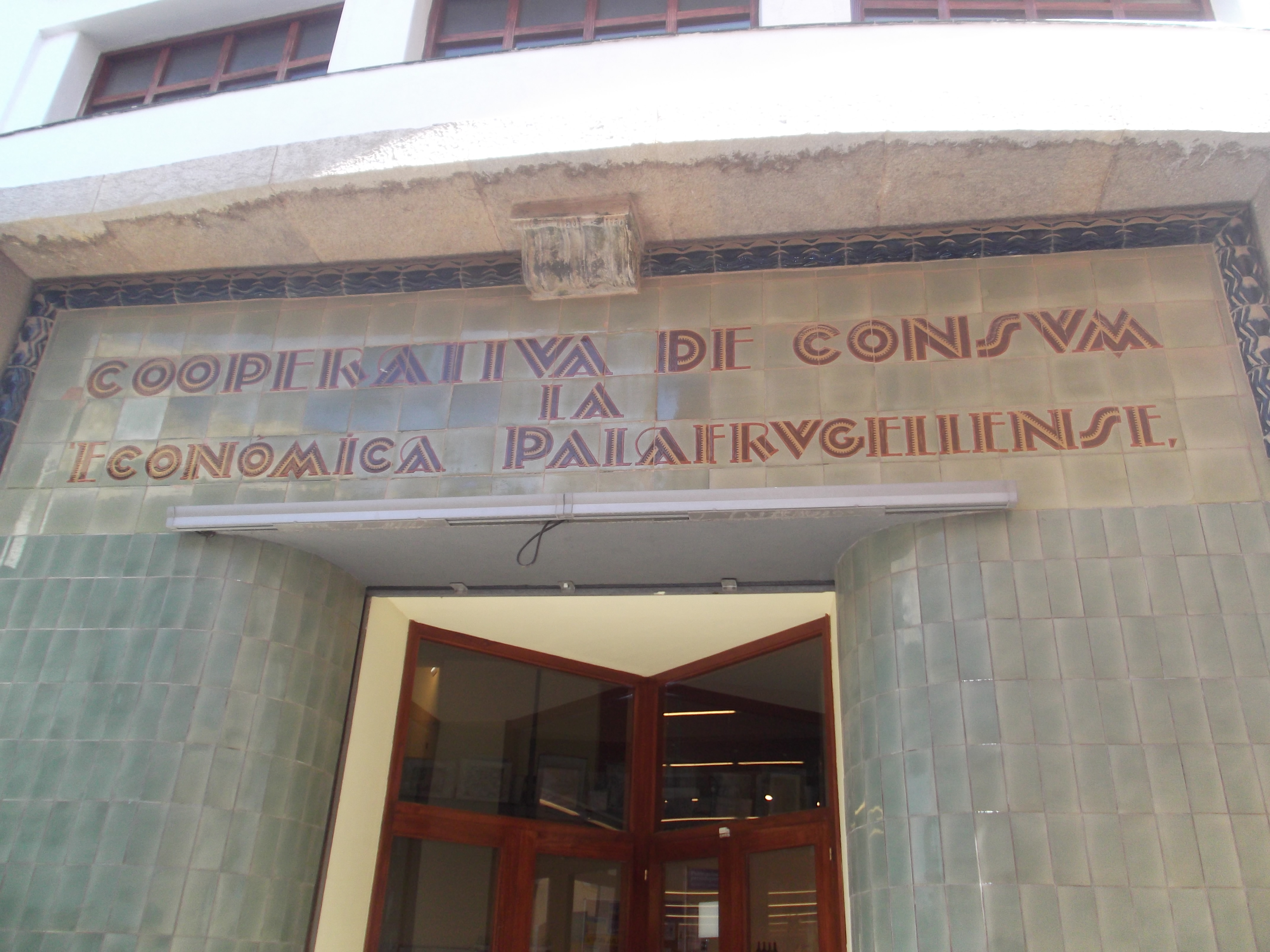 Façana de l'Econòmica Palafrugellenca, ara la Biblioteca de Palafrugell